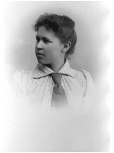 Elizabeth Stephansen (1872-1961), matemàtica noruega